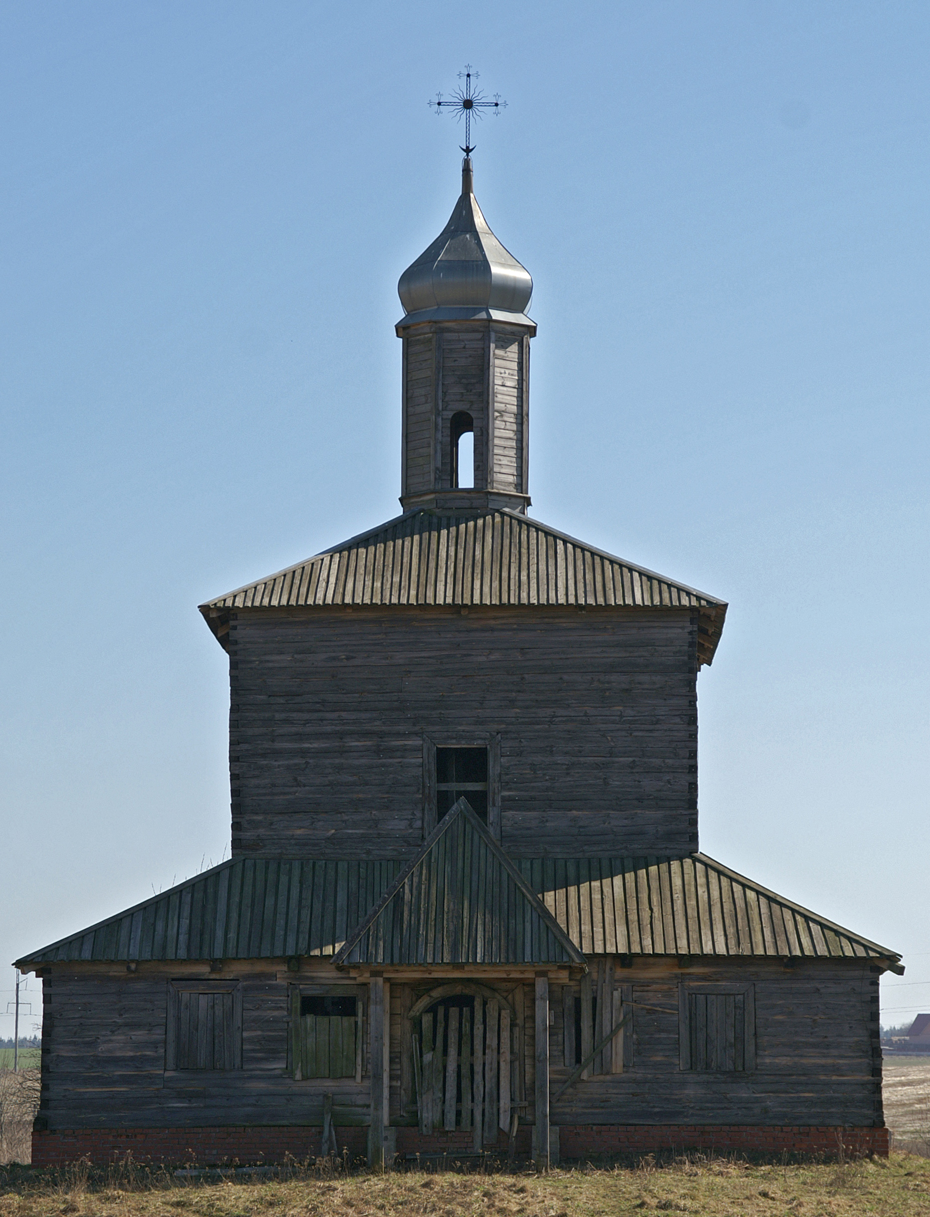 Беларуская (тарашкевіца): Спаса-Праабражэнская царква зь в. Барань Аршанскага раёну Віцебскай вобласьці. в. Азярцо This is a photo of Belarusian heritage monument. Reference number: 612Г000400 ( WLM)